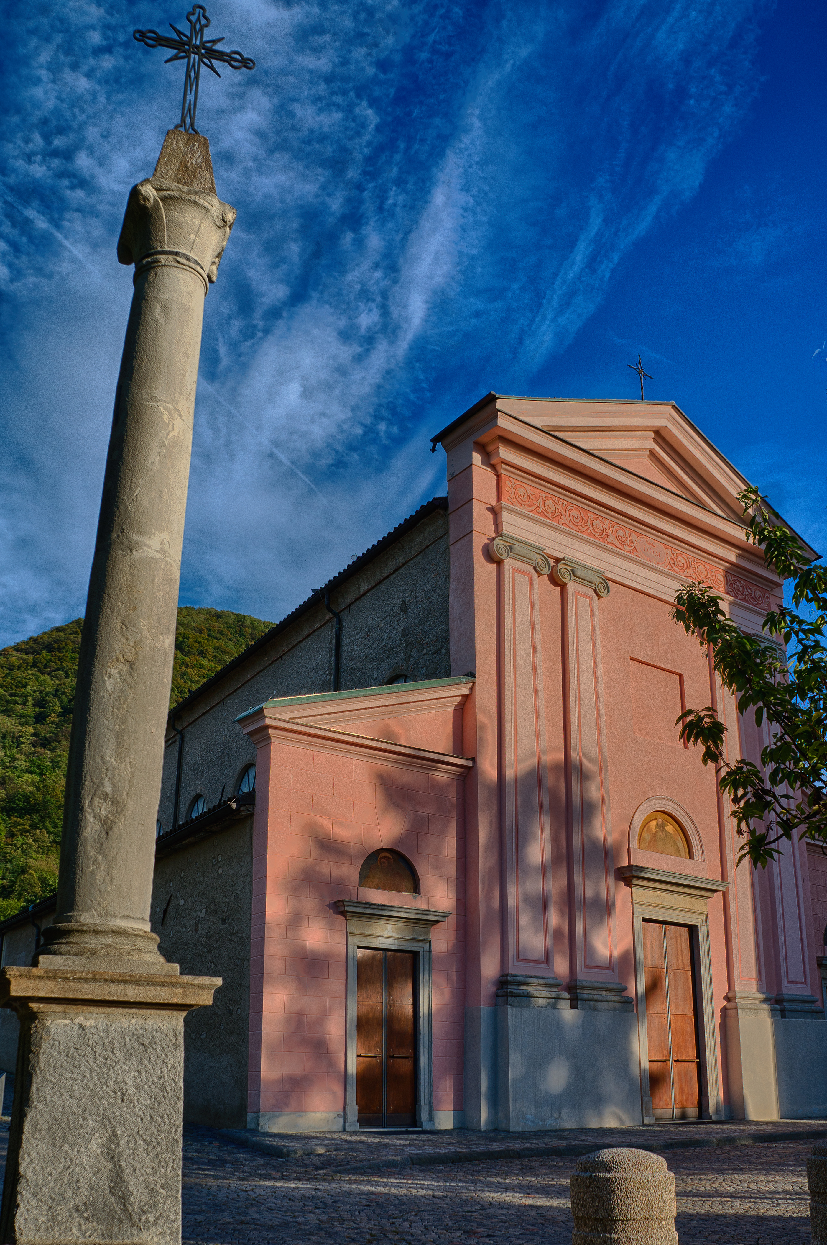 La chiesa parrocchiale è situata nella zona alta, a Pazzalino, ed è dedicata a s. Maria della Purificazione. La chiesa, una costruzione barocca del 1500, posta sotto la protezione dell’Ufficio cantonale dei Beni culturali, è stata restaurata nel corso degli anni 2000 - 2002.